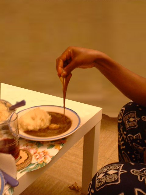 Plat de Nkui (nkwi) camerounais.